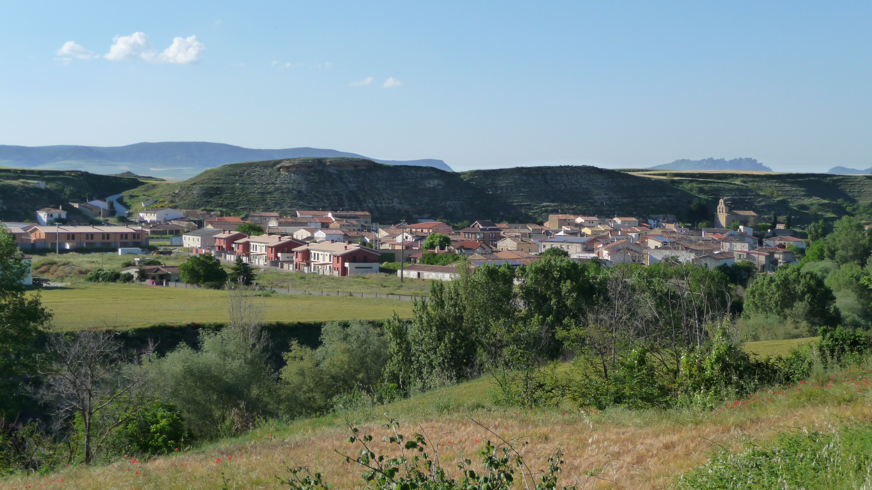 Panorámica de Ochánduri en La Rioja (España)